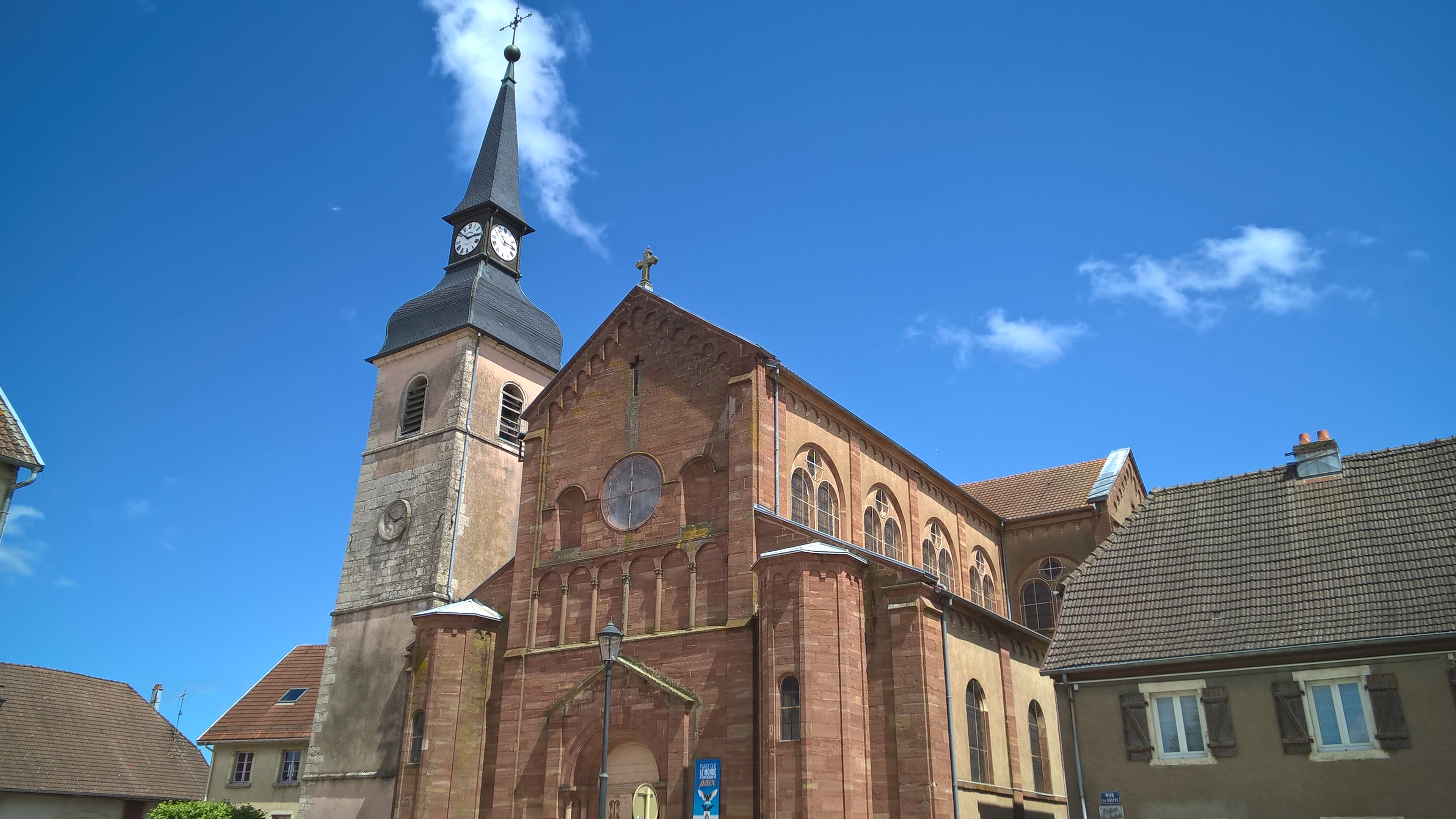 Grandvillas église